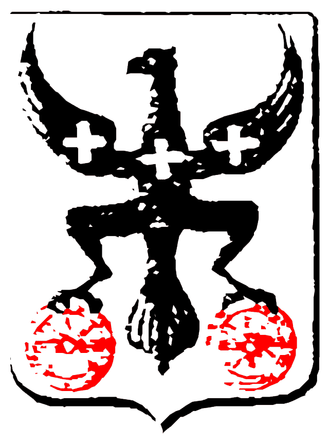 Description : blason de la famille de Jean de Mansencal Source : Armor. 1696, 441.